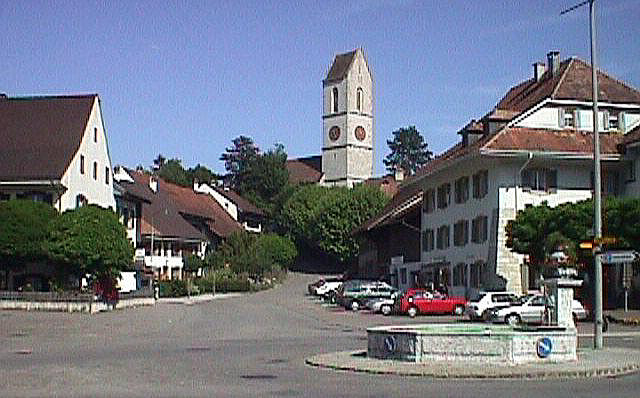 Dorfplatz CH-4460 Gelterkinden BL